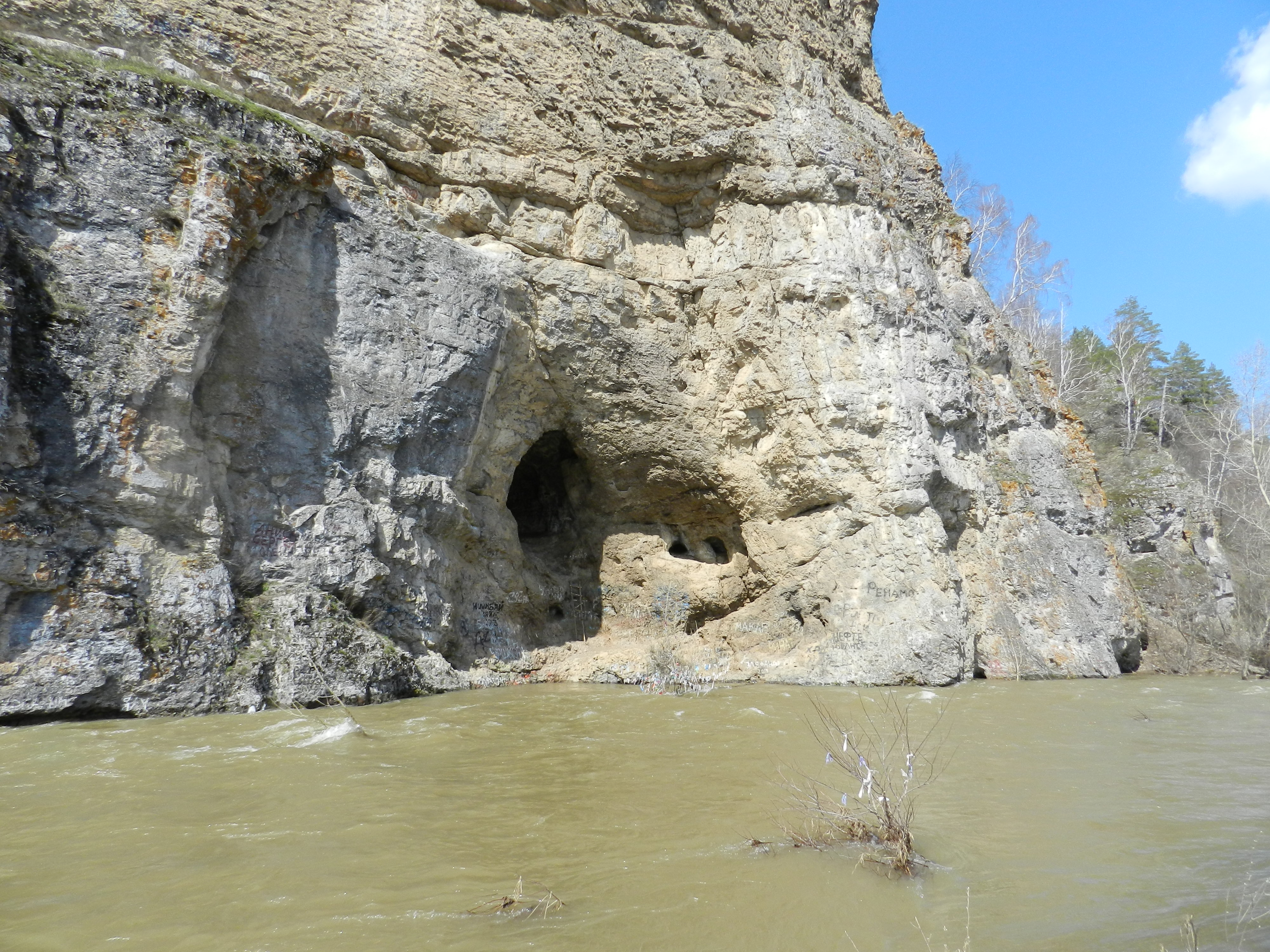 Скала Калим-ускан и пещера Салавата Юлаева: Ишимбайский район, Башкортостан This image is related to the protected area of Russia number 0210162